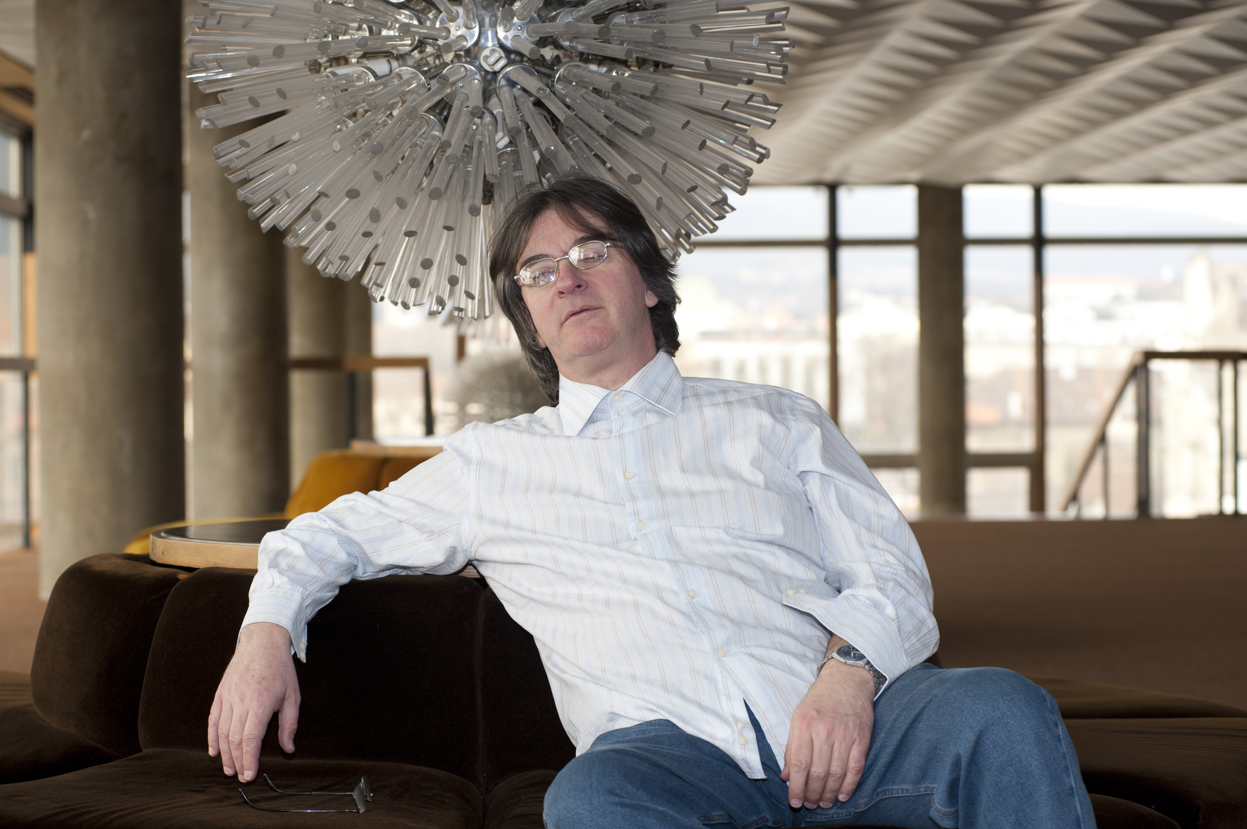 Zoran Bručić